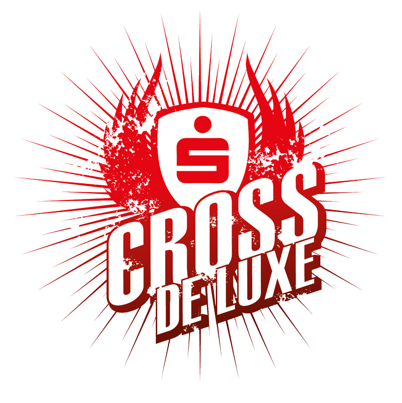 Logo des Cross de Luxe